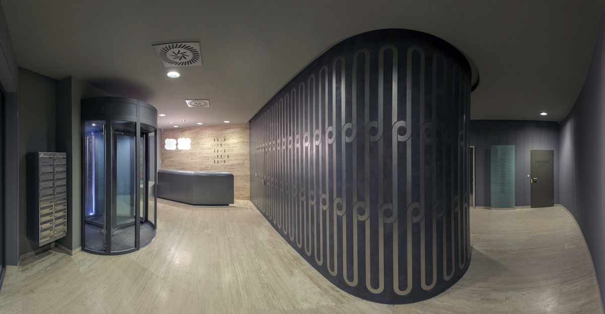 BGS interiér